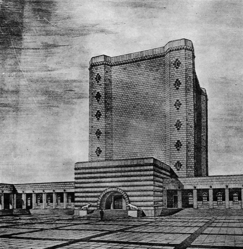 Johannes Krüger'in Anıtkabir projesi